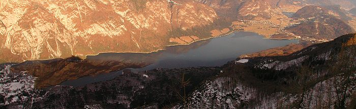 Bohinjsko jezero - zimska panorama Foto Boštjan Burger, januar 2005